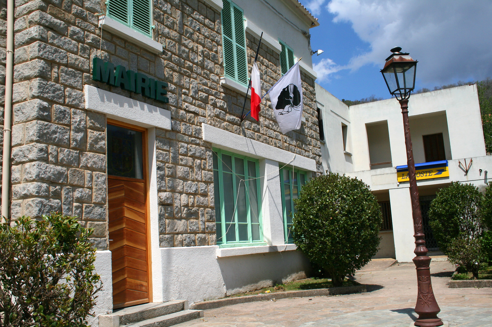 Bastelica France (Corse du Sud), la mairie. Corsu: Bastelica Francia (Corsica), u casa cumuna. Walon: Bastèlica France (Corse-do-Sud), li môjon comunale.